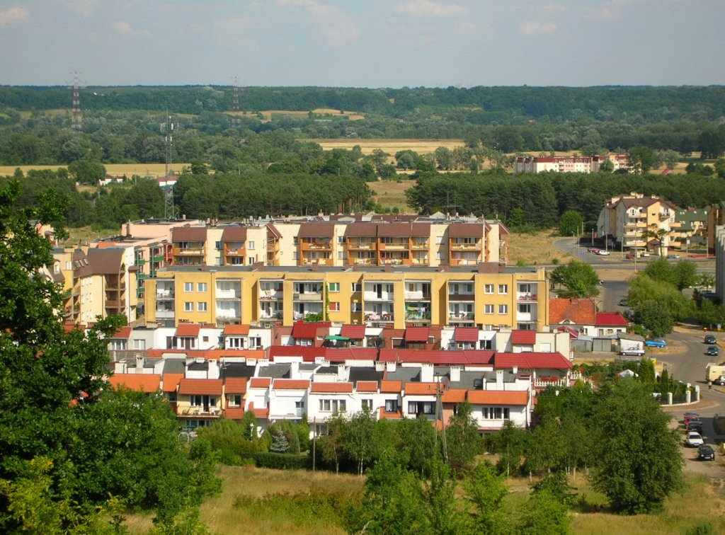 Widok ze Zbocza Fordońskiego